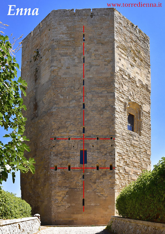 Sulla facciata Sud/Ovest della Torre ottagonale di Enna i Siculi riprodussero lo schema fondamentale della Delimitatio Templus Caeleste di Sicilia, tutt’oggi ancora ben visibile, formato dal decumano (otto finestrelle in verticale) e dai due cardini (in totale otto finestrelle parallele fra loro in orizzontale).